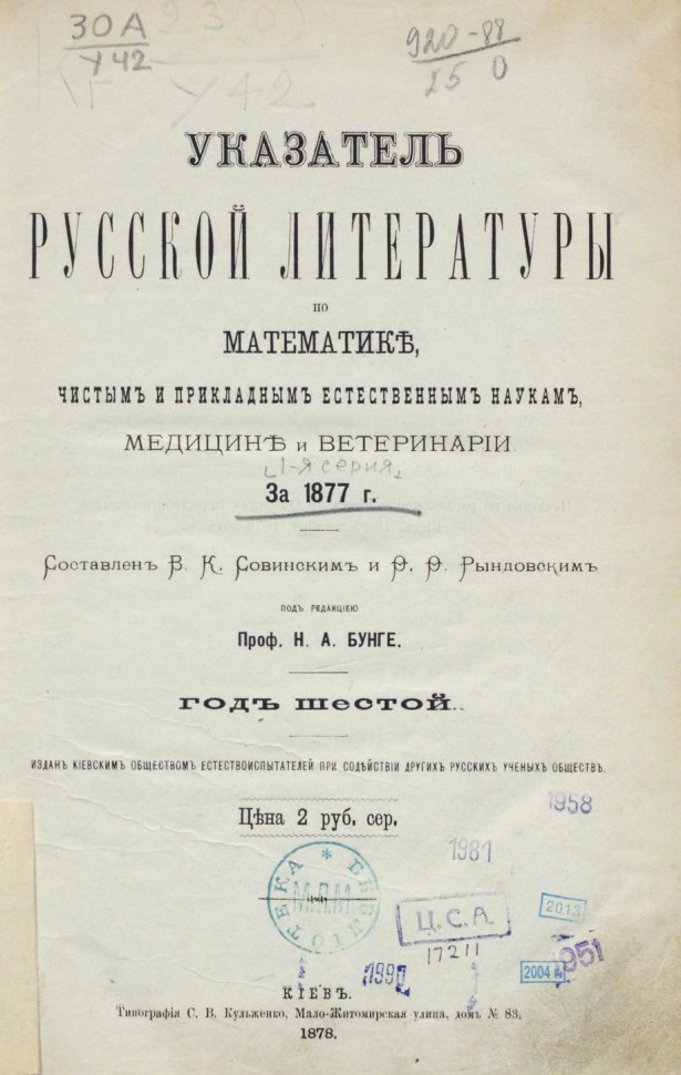 Указатель русской литературы по математике, чистым и прикладным наукам, медицине и ветеринарии. 1877 год. Под редакцией Н.А. Бунге